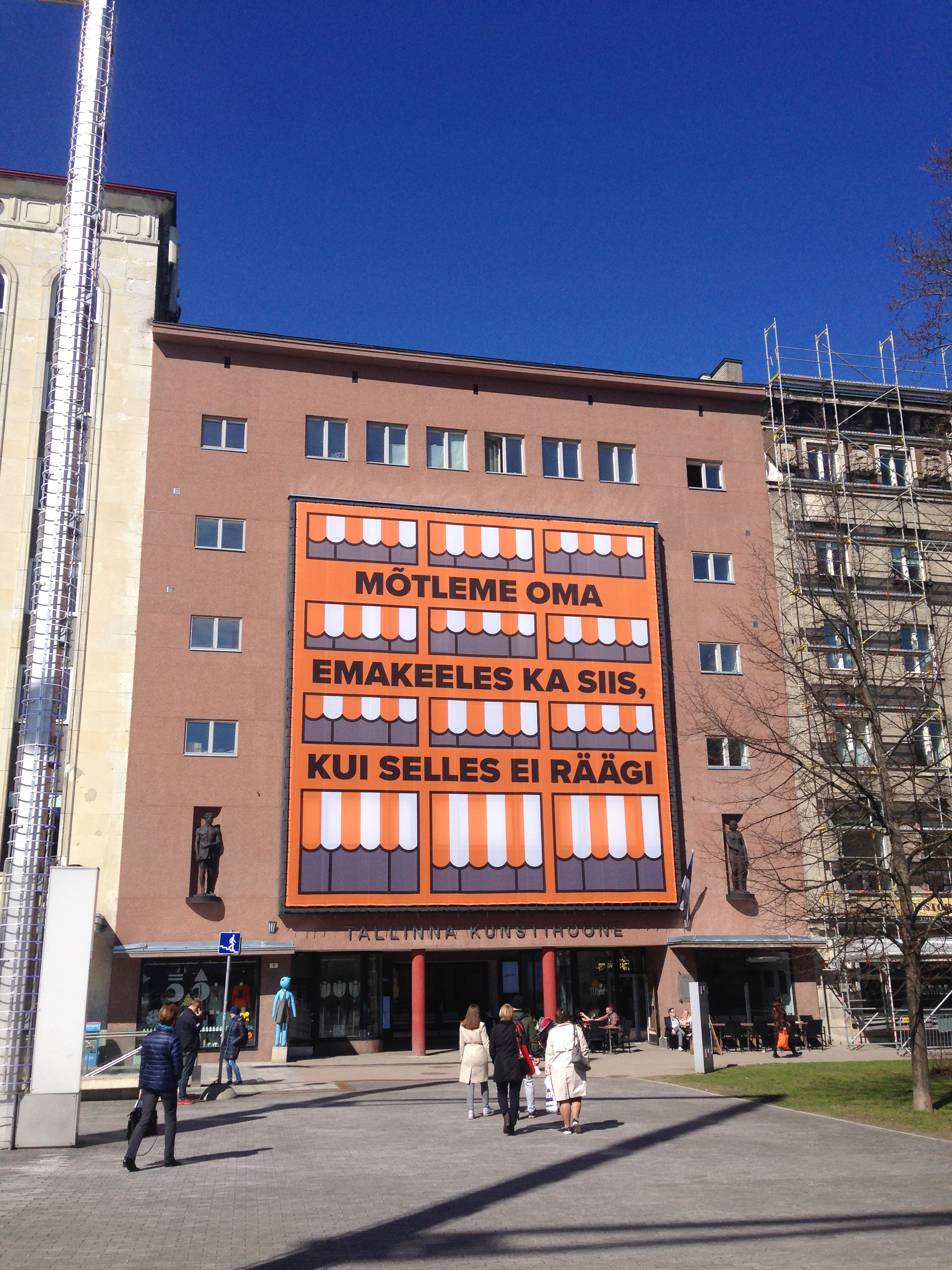 Tallinna Kunstihoone 2018. aasta kevadel.